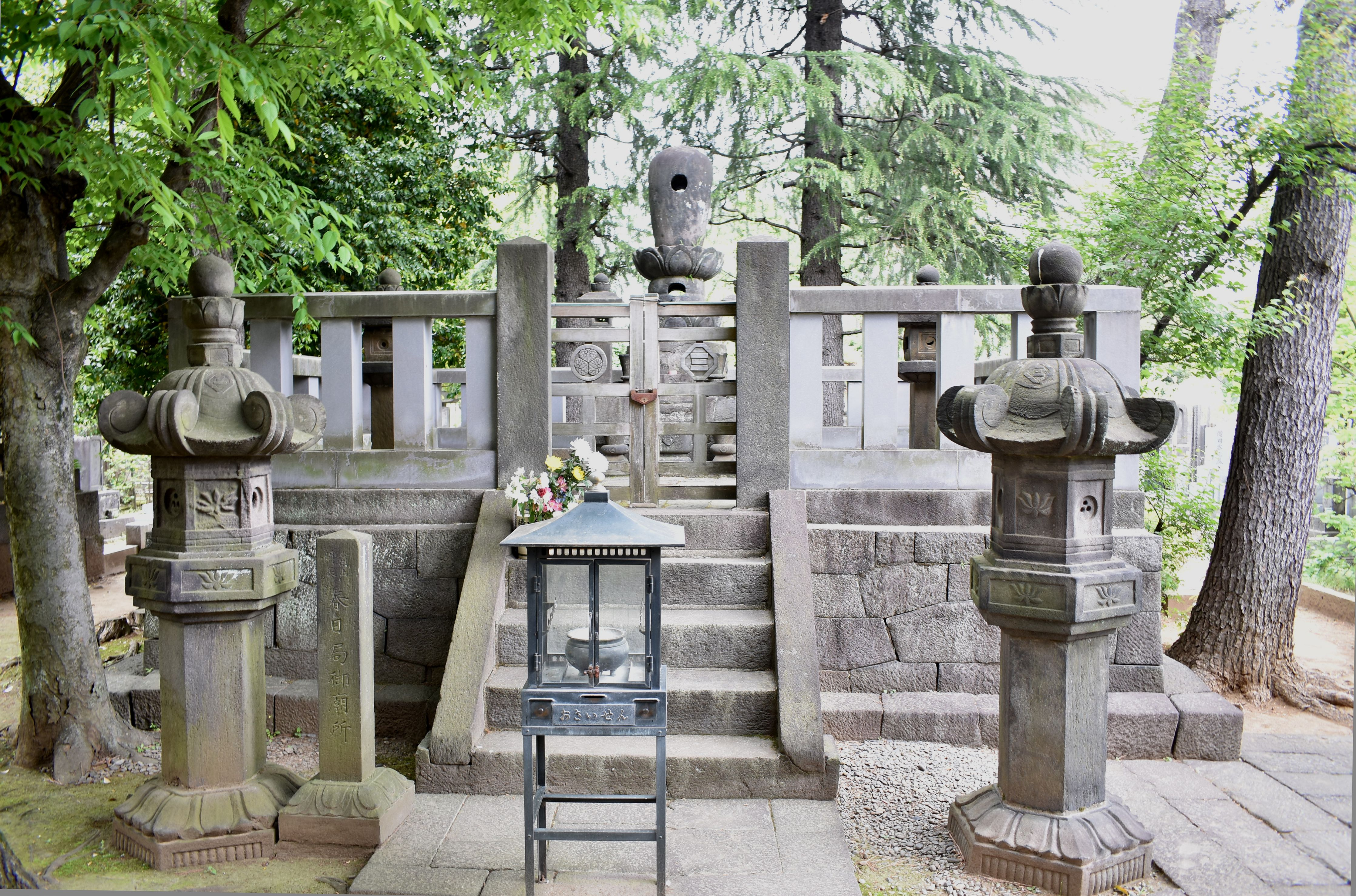 文京区湯島 麟祥院 Nikon D3400